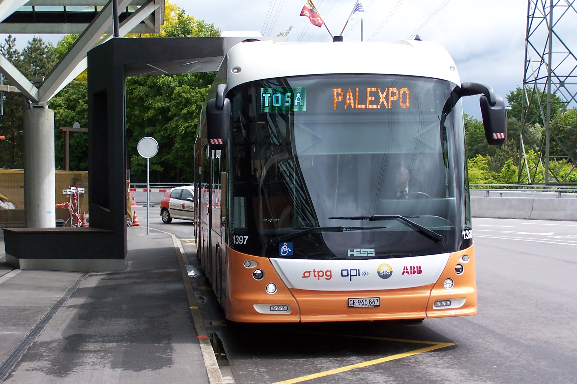 Bus TOSA a l'arrêt aéroport pendant le salon UITP.